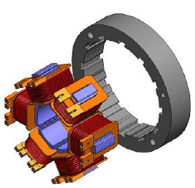 Aufbau eines Stators mit gesteckten Zahnspulen